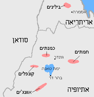 מפת התפוצה של האגאווים